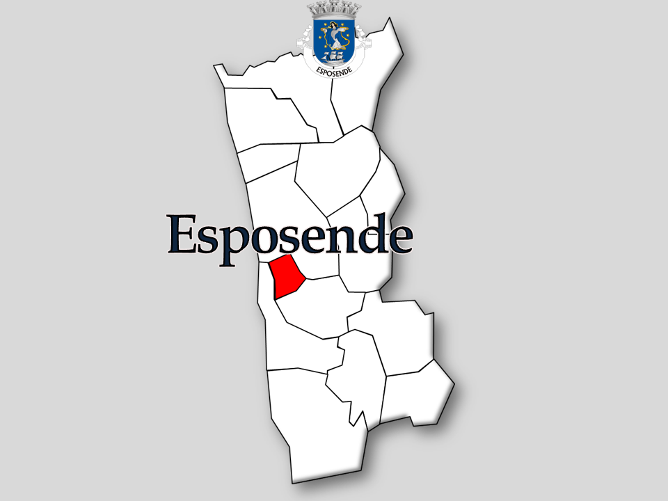 Censos 1864/2011